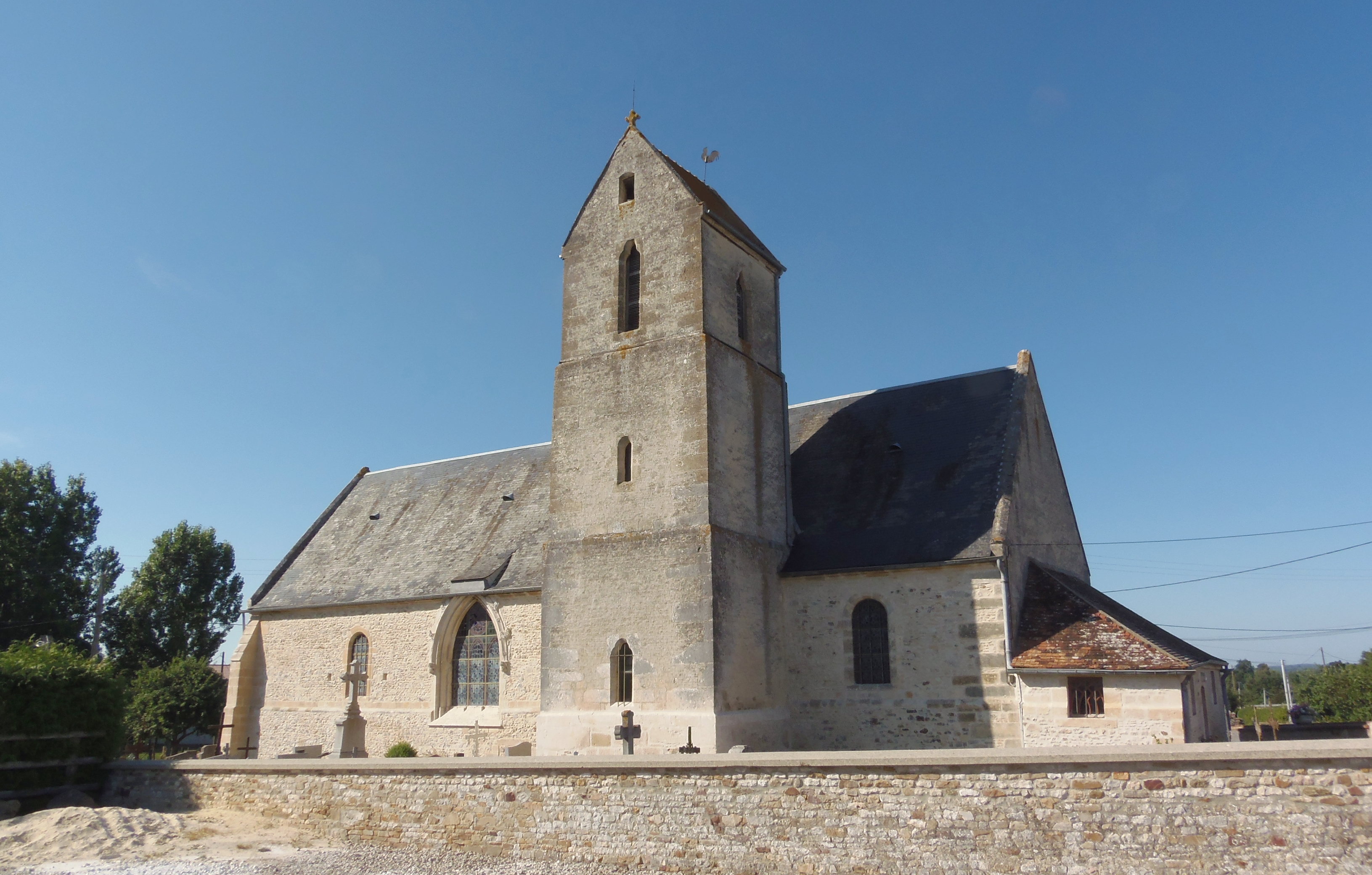 Coulonces (Normandie, France). L'église Saint-Paterne.